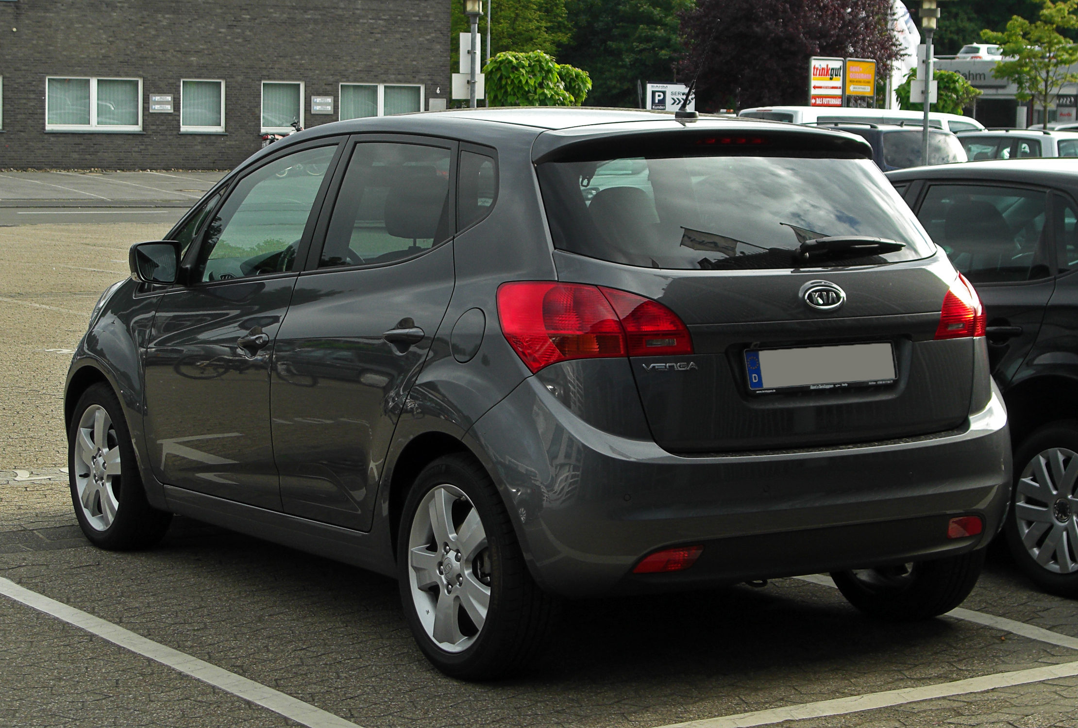 Kia Venga